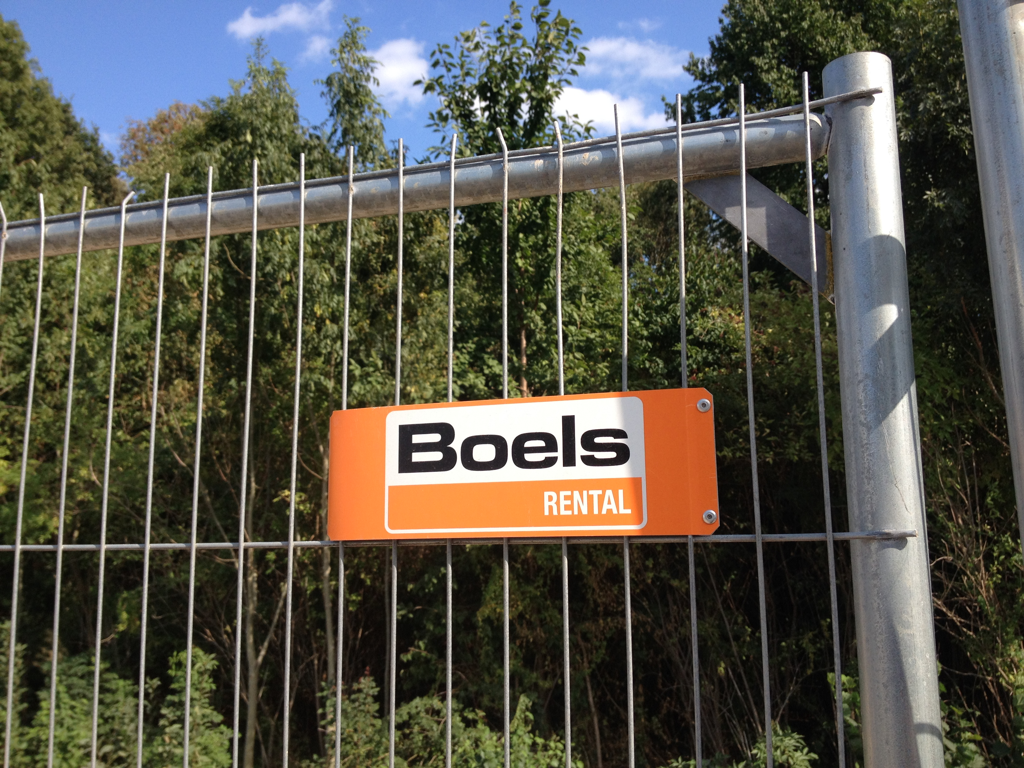 5e etappe van de Boels Ladies Tour 2018 door Zuid-Limburg, finish in Sittard op het Tom Dumoulin Bike Park.